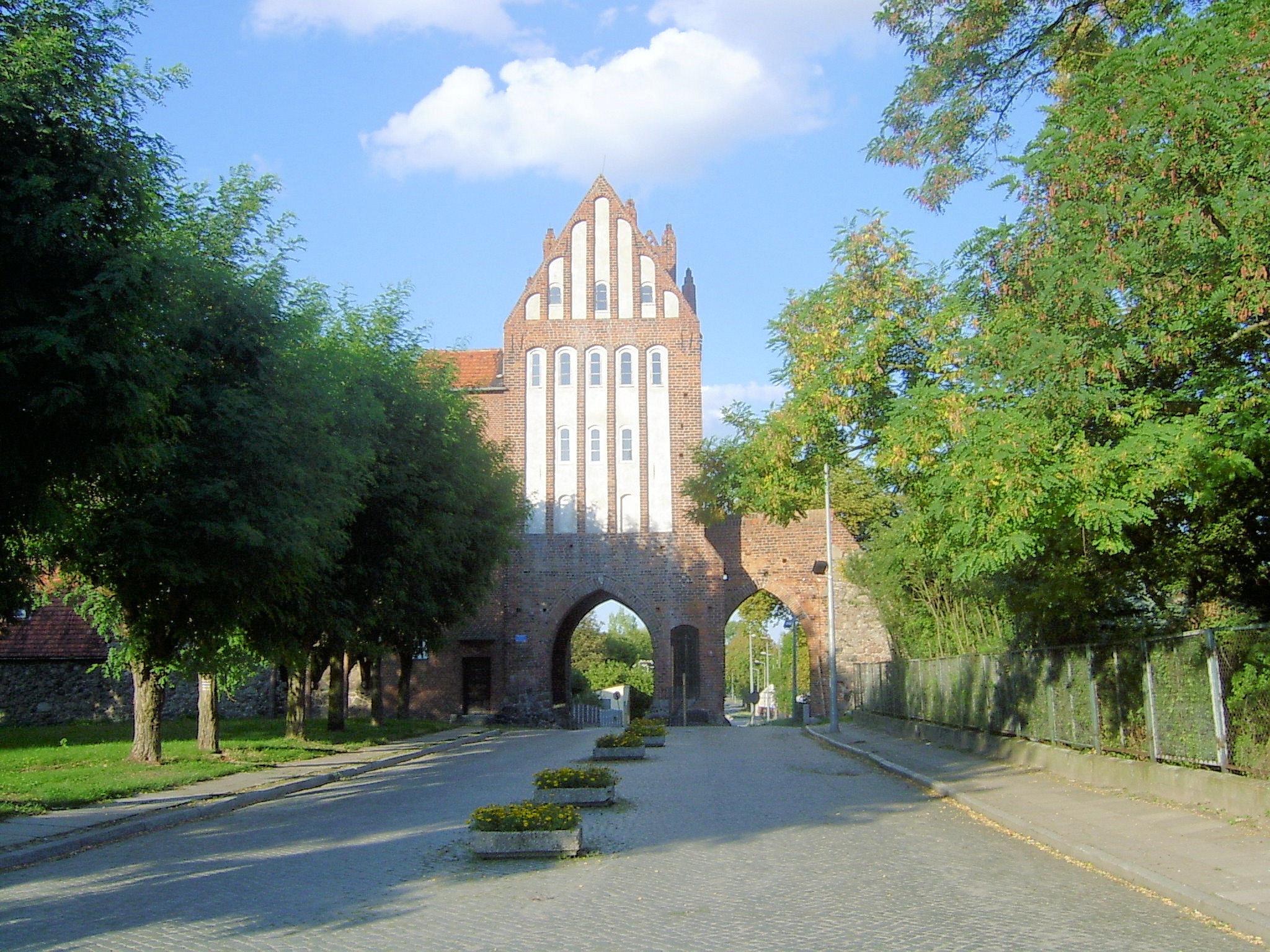 Strzelce Krajeńskie Brama Młyńska (city gate - Młyńska) - Poland